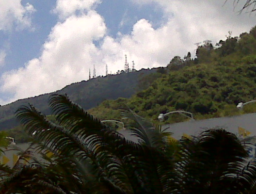 antenas del Cerro El Volcán enel municpio El Hatillo, Estado Miranda - Venezuela